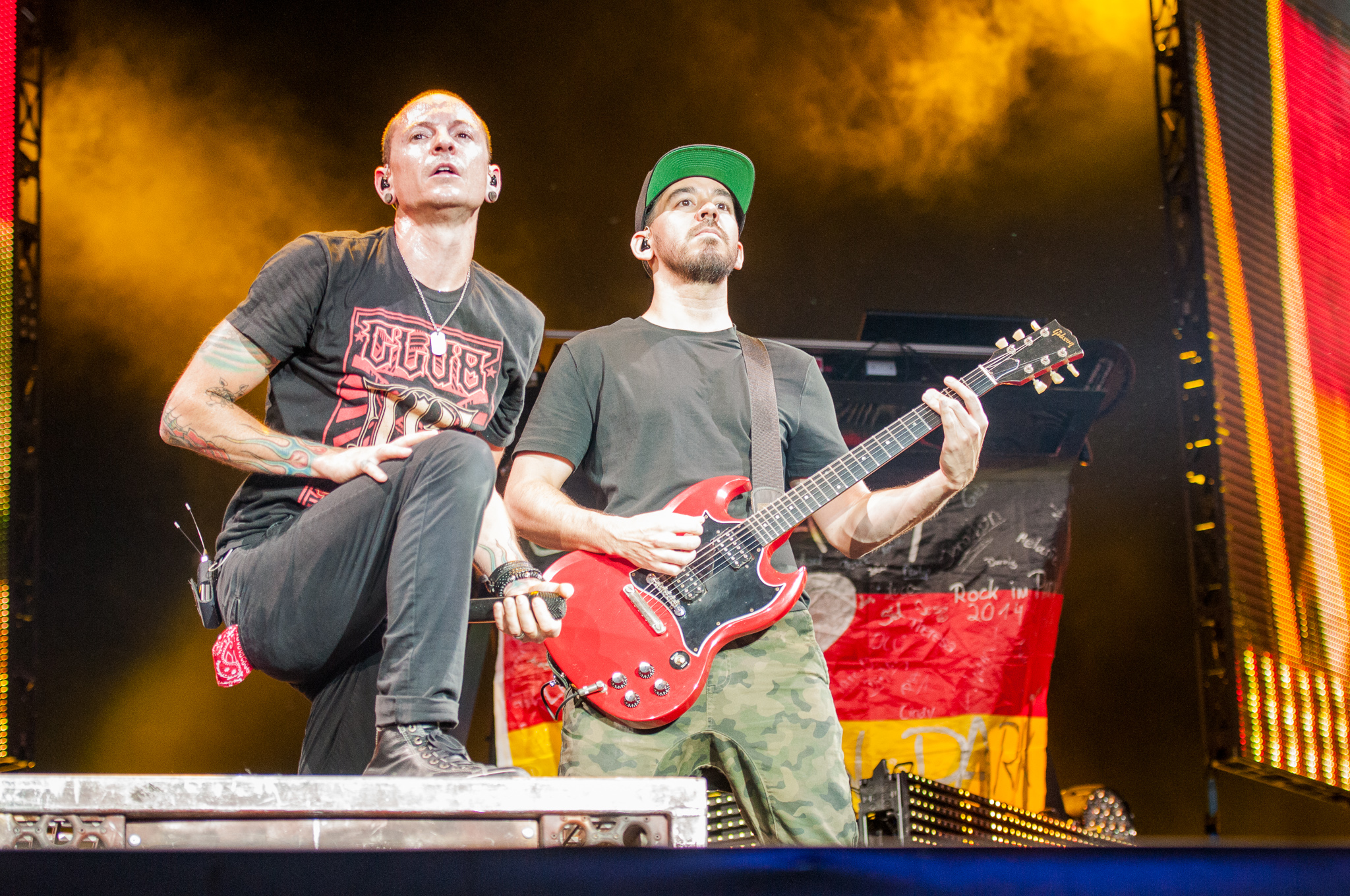 ARGO-Konzerte,Centerstage,Chester Bennington,Konzert,Linkin Park,Livekonzert,Livemusik,Mike Shinoda,Musik,RiP,Rock im Park 2014